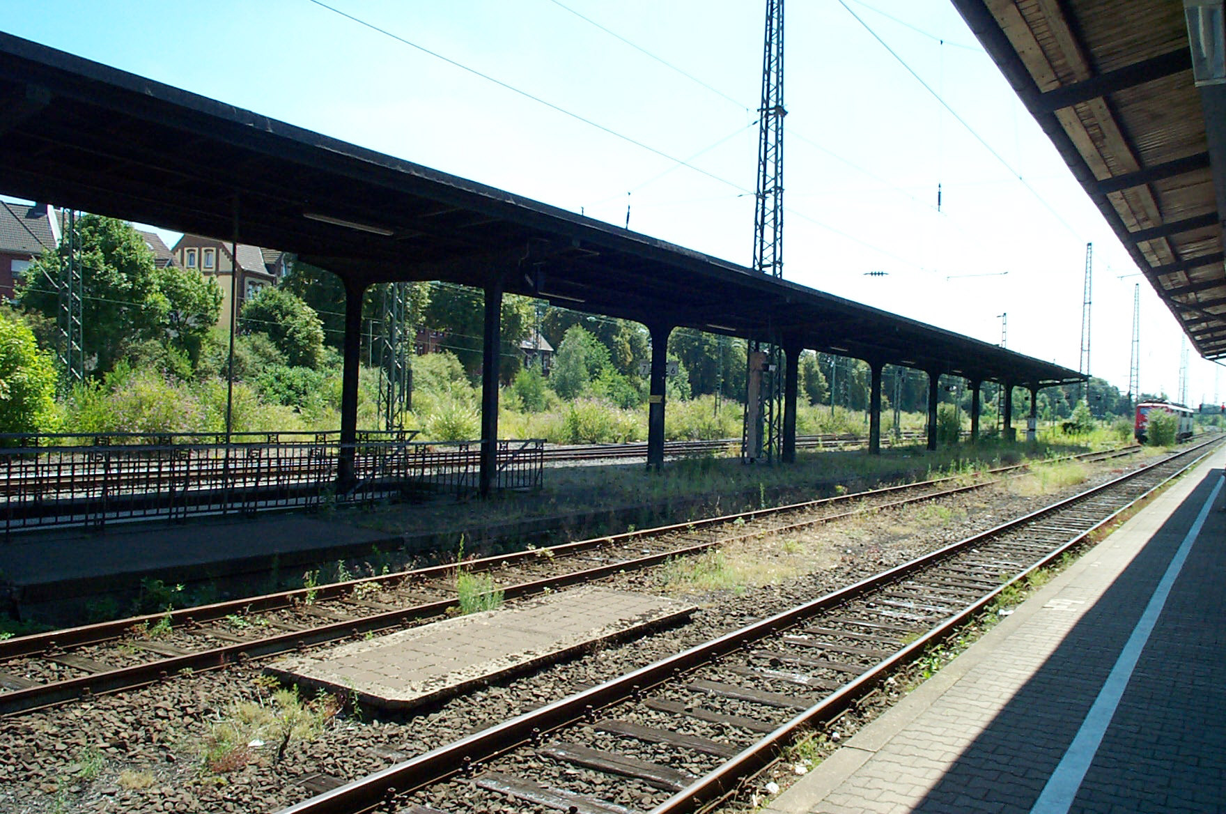 Bahnsteig des ehemaligen Balkanexpress im Bahnhof Opladen